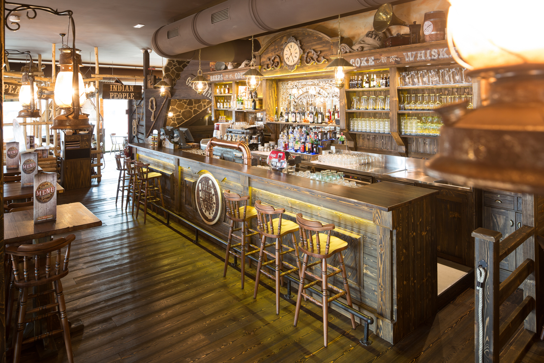 Interno di un ristorante Old Wild West